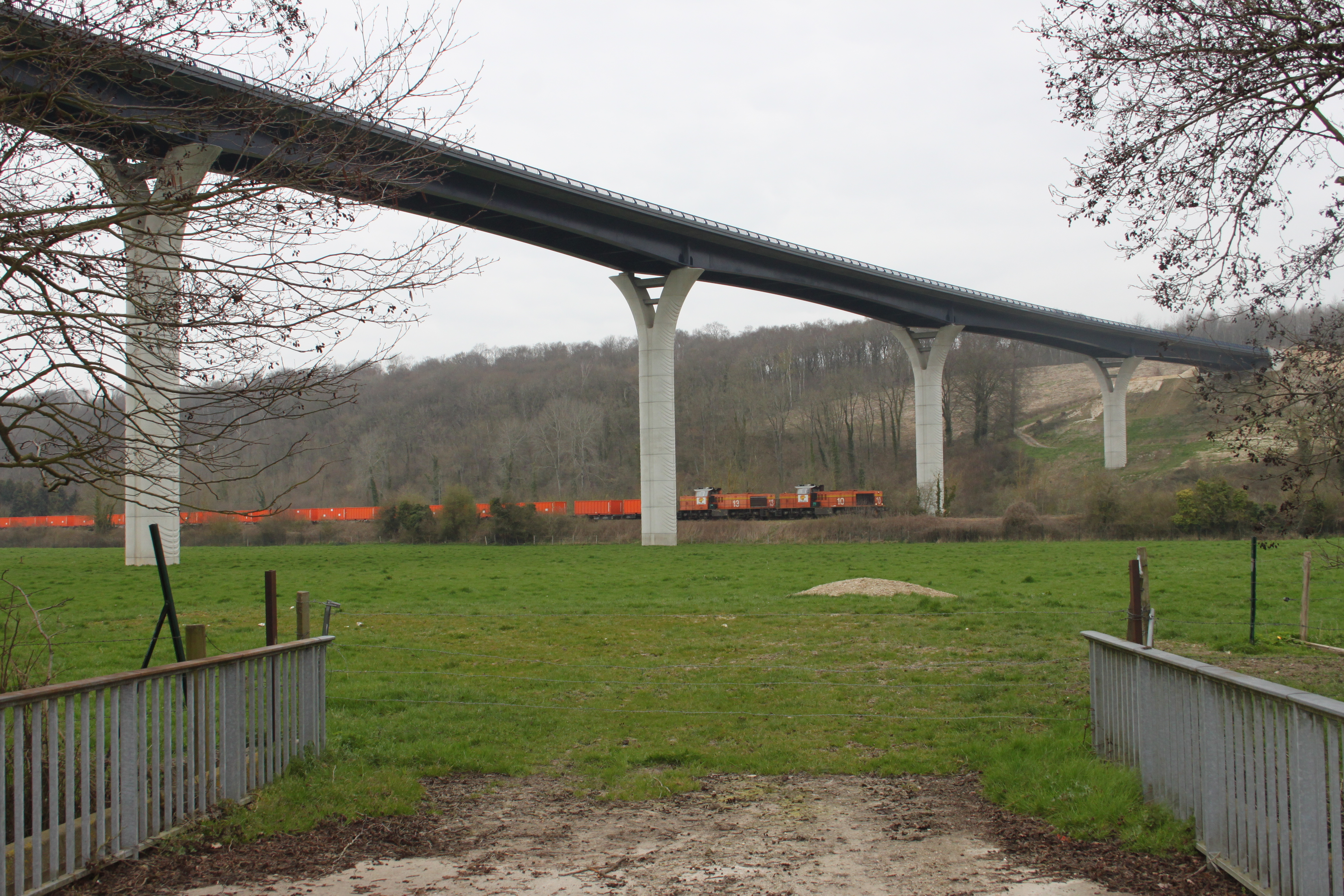 Manéhouville(76), viaduc de la Scie, passage d'un train de terre ( issues du chantier d'une section de la RN27 situé sur les communes de Manéhouville et Tourville-sur-Arques ) à destination du Terminal Forestier du port de Rouen, pour l'écoquartier Flaubert à Rouen . ( tracté par les machines locomotives diesel Vossloh G 1206 COLAS RAIL n°10 et 13 ) .